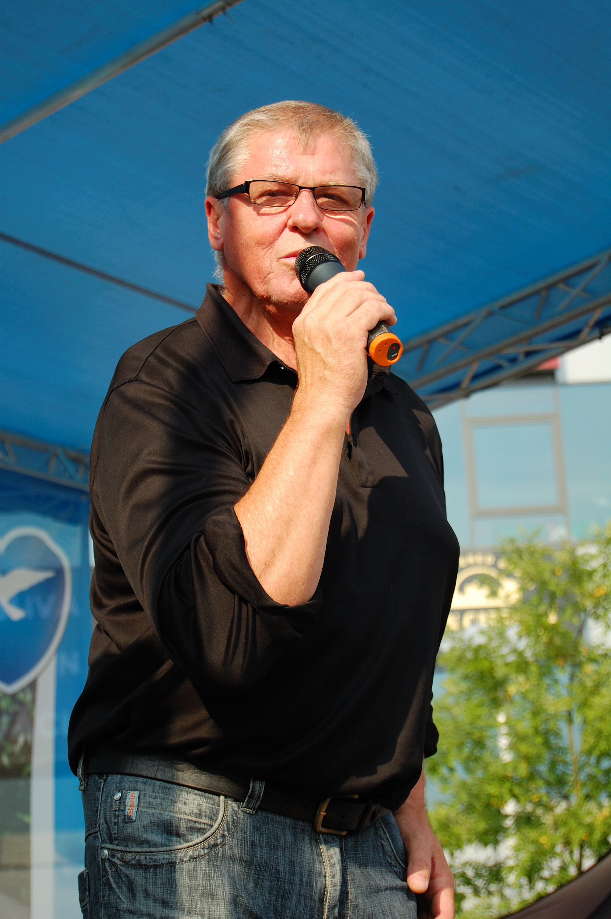 Láďa Kerndl